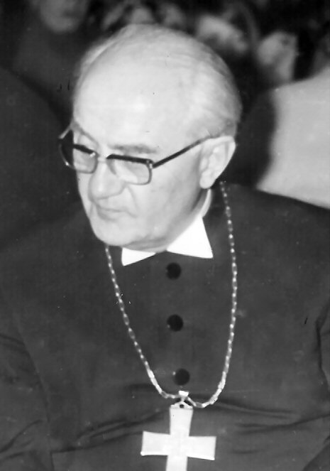 Bischof Alfred Petersen